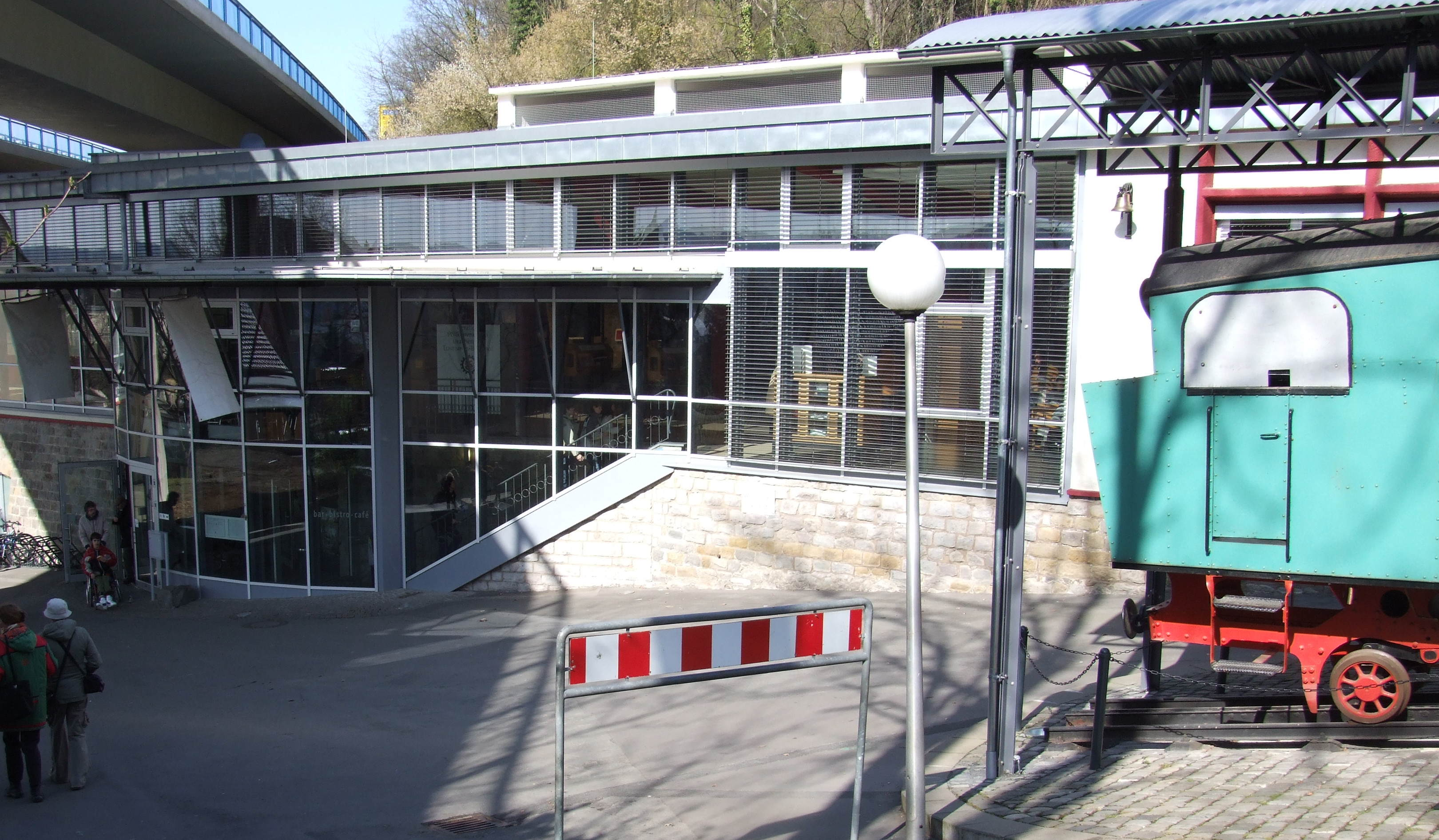 Besucher-Zentrum, Tourist-Information, Bahnhof Drachenfelsbahn